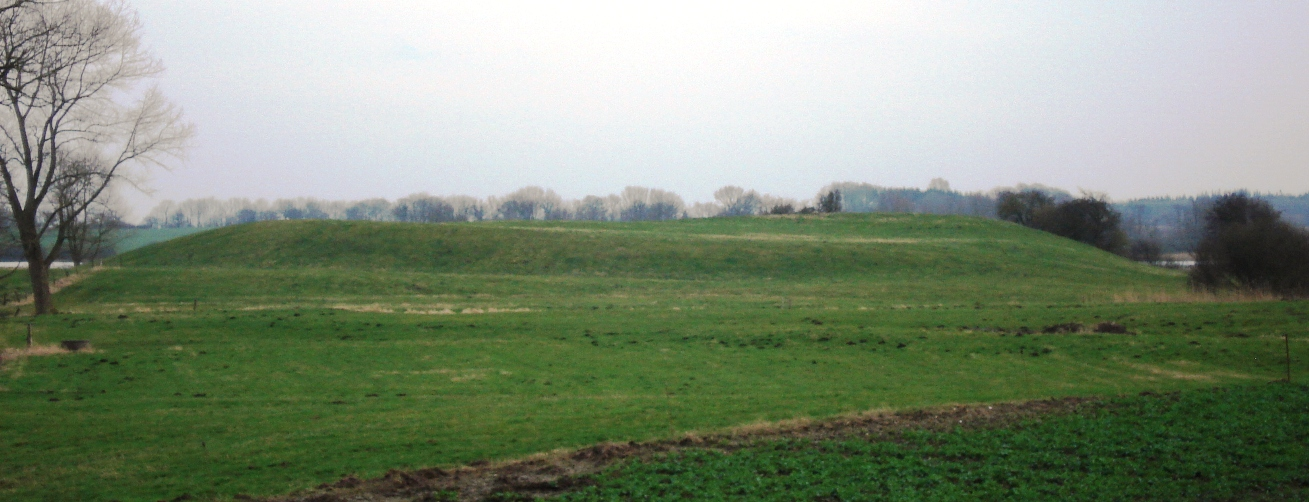 Süseler Schanze - Nord